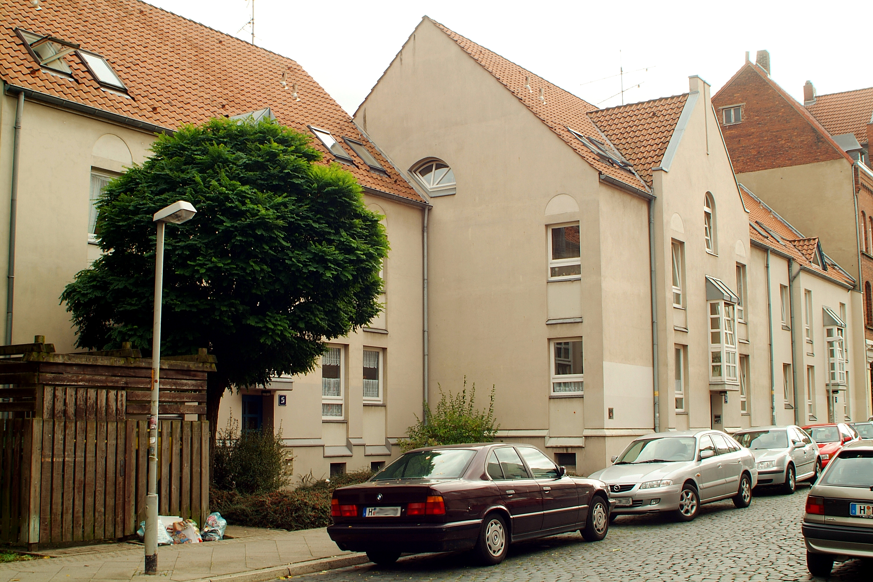 Blick entlang der Gruppe Viktoriastraße 25, 24, und 23 in Hannover, Stadtteil Linden-Nord; der Neubau der 1 1/2-geschossigen Wohngebäude erhielt 1983 die Auszeichnung "Sieger im [niedersächsischen] Landeswettbewerb Bauen und Wohnen in alter Umgebung ...